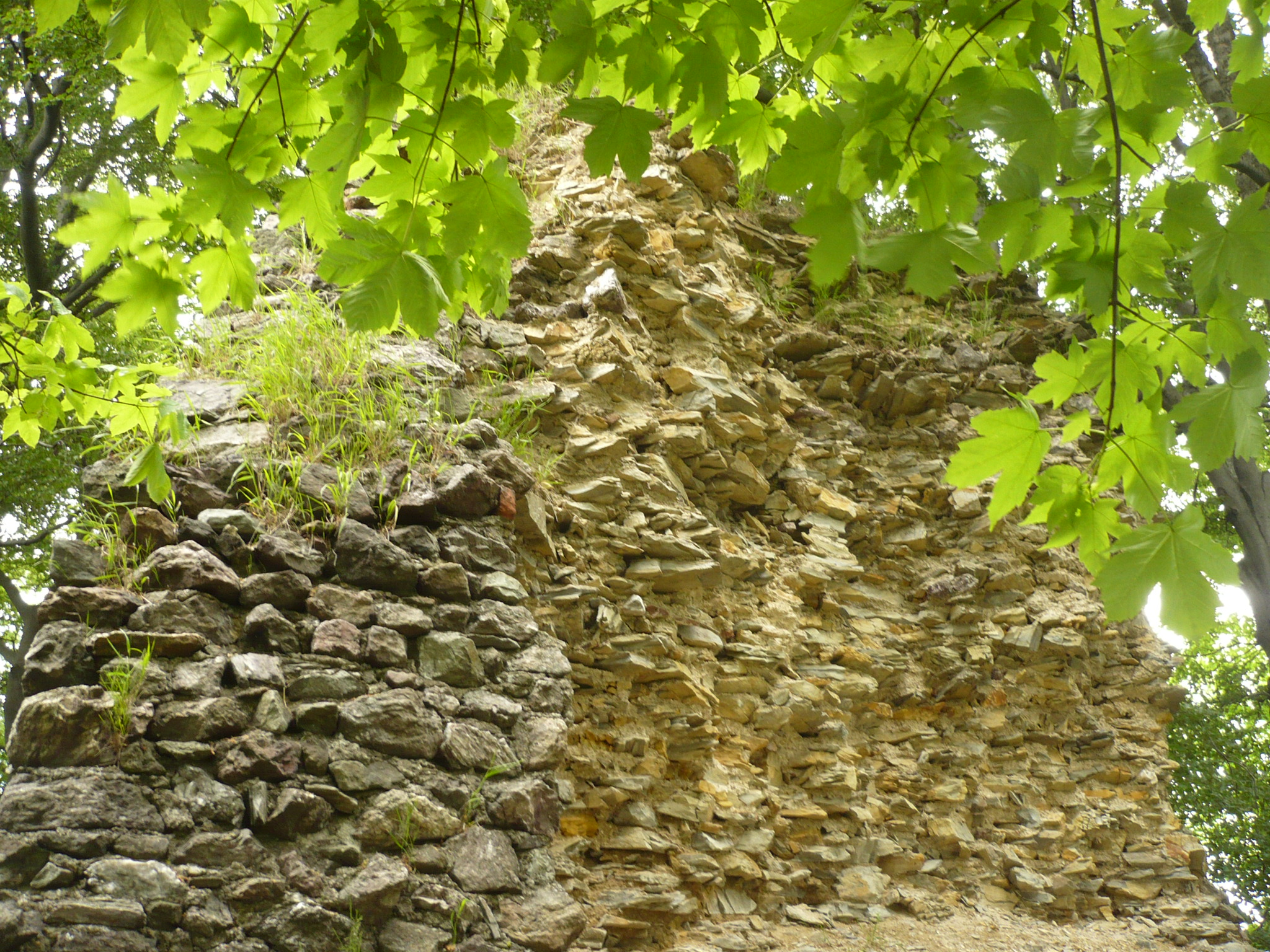 Zamek Homole